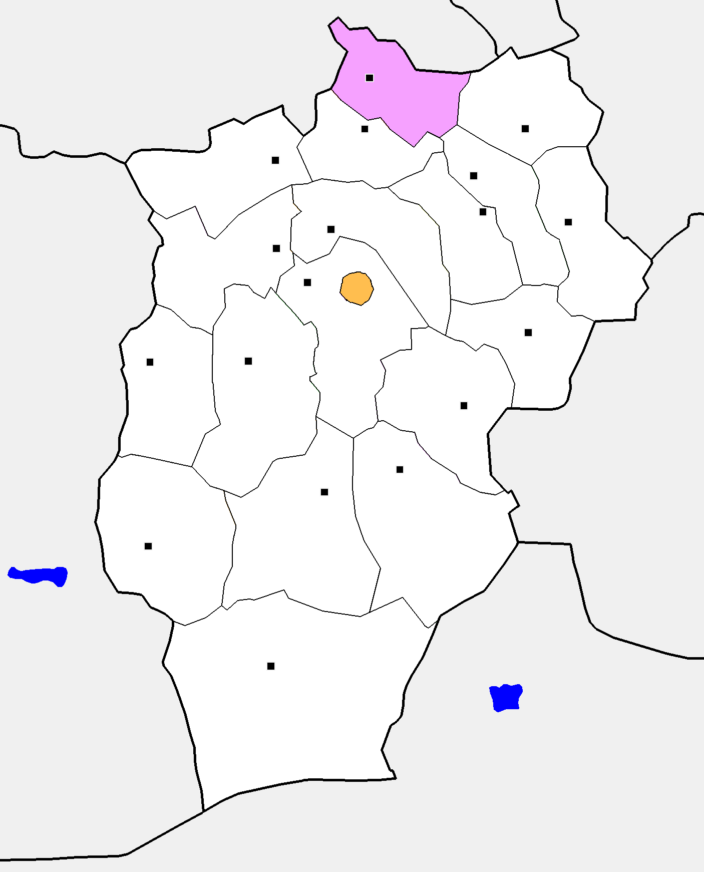 Монгол: Өвөрхангай аймгийн Хархорин сумын байршил